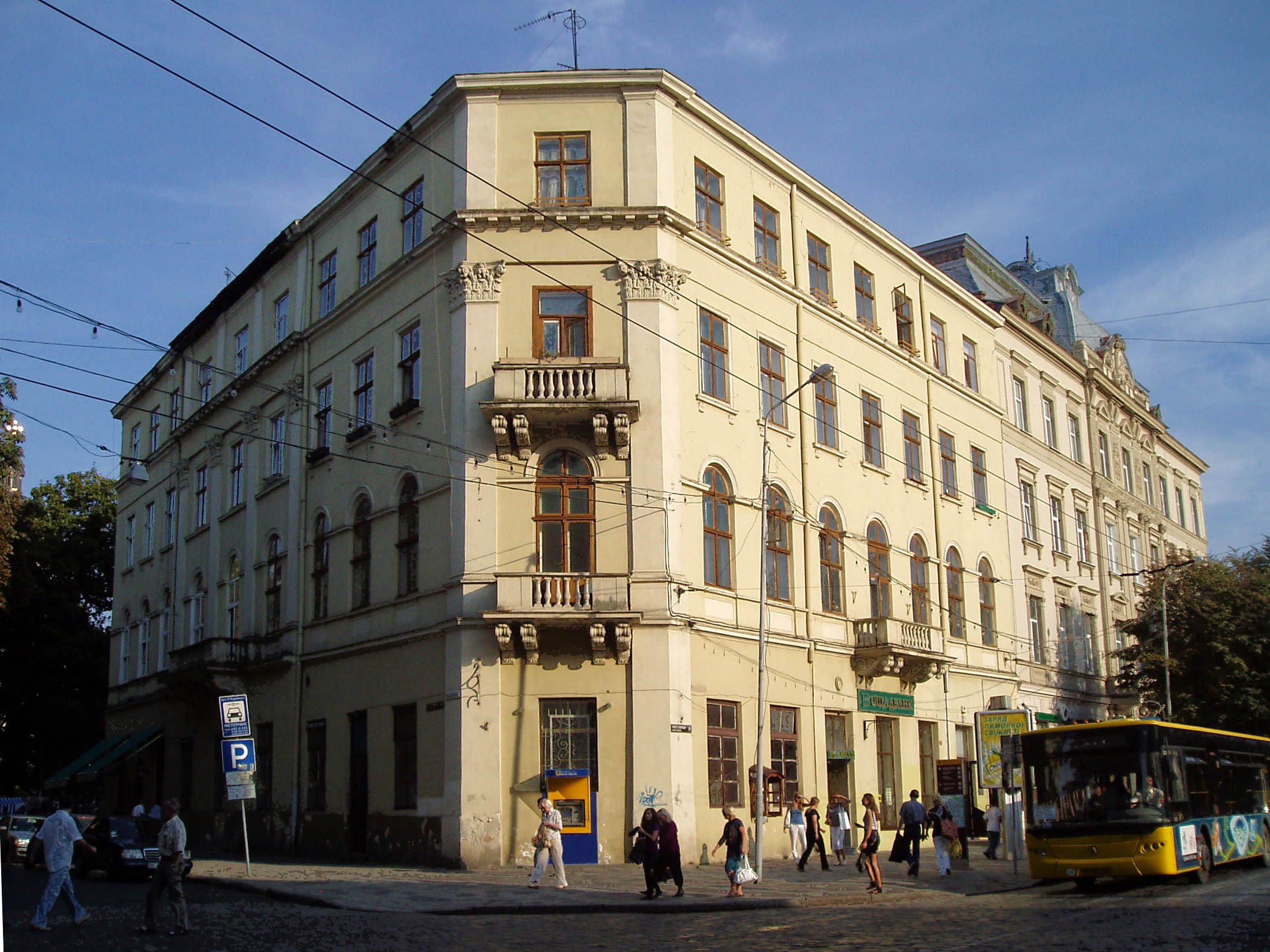 Дім № 24 на проспекті Свободи, на розі з вулицею Лесі Українки. Архітектор Йоган Зальцман (1807—1869).